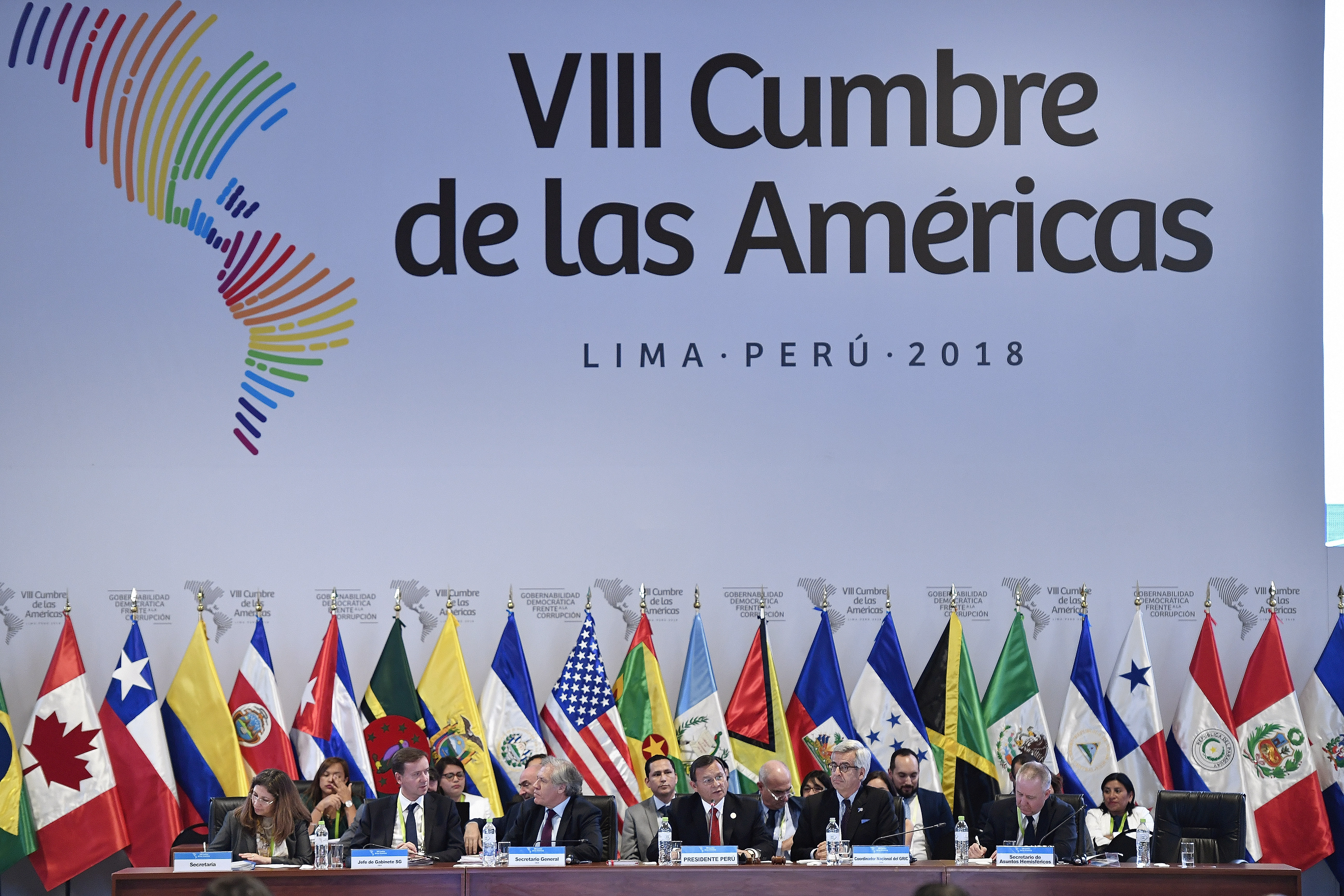 Reunión de cancilleres en el marco de la VIII Cumbre de las Américas en Lima - Perú (2018)